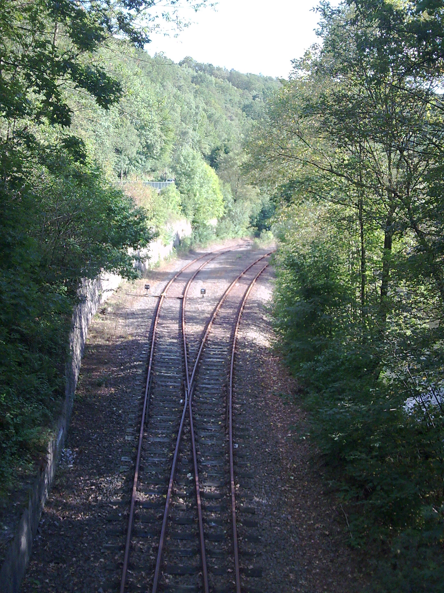 Abzweig zum ehem. Brecher bzw. Anschluss Wiehl RWE, von der Brücke neben dem Haltepunkt Alperbrück aus fotografiert